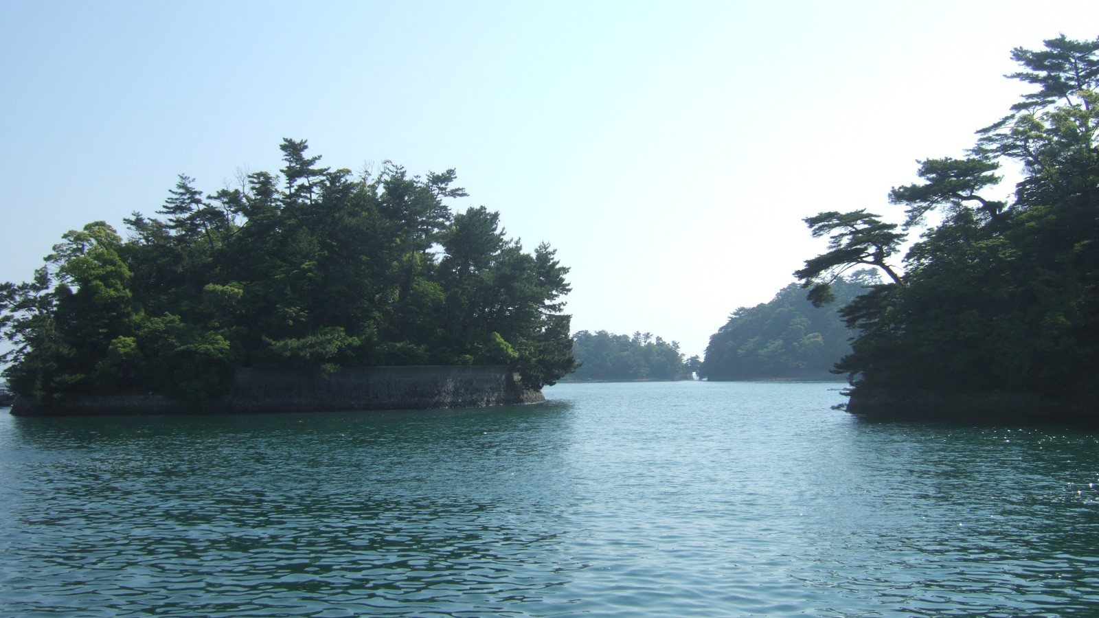 九十九島（つくもじま）：長崎県島原市